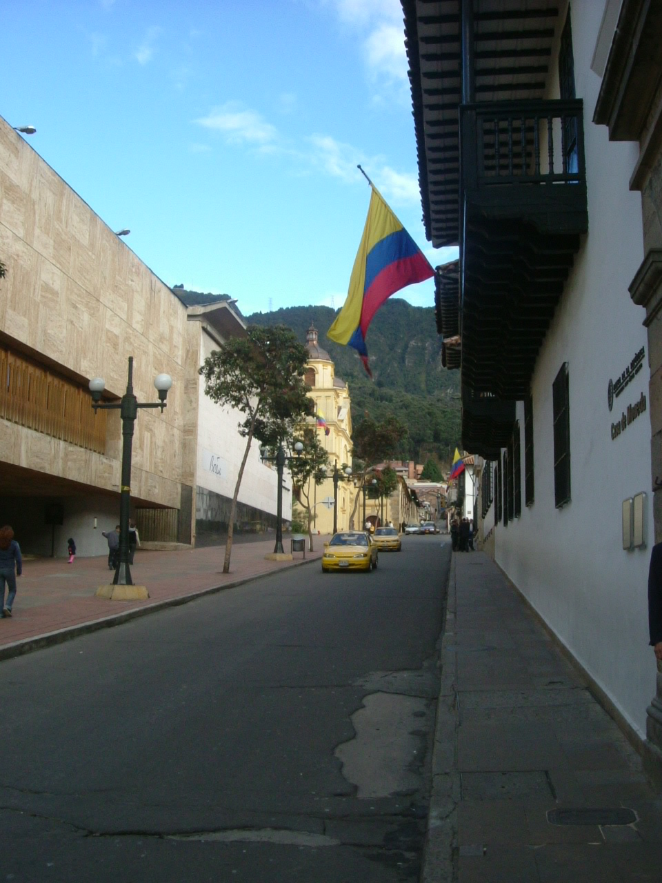 Fuera del museo Botero, Colombia. Aut. Jorge Amador Leon (MEXICO)